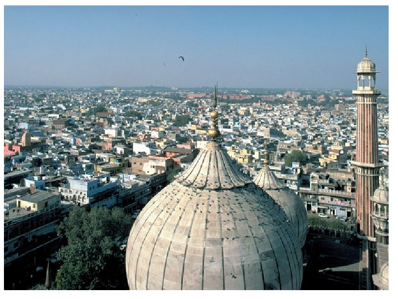 Delhiko ikuspegia, India.